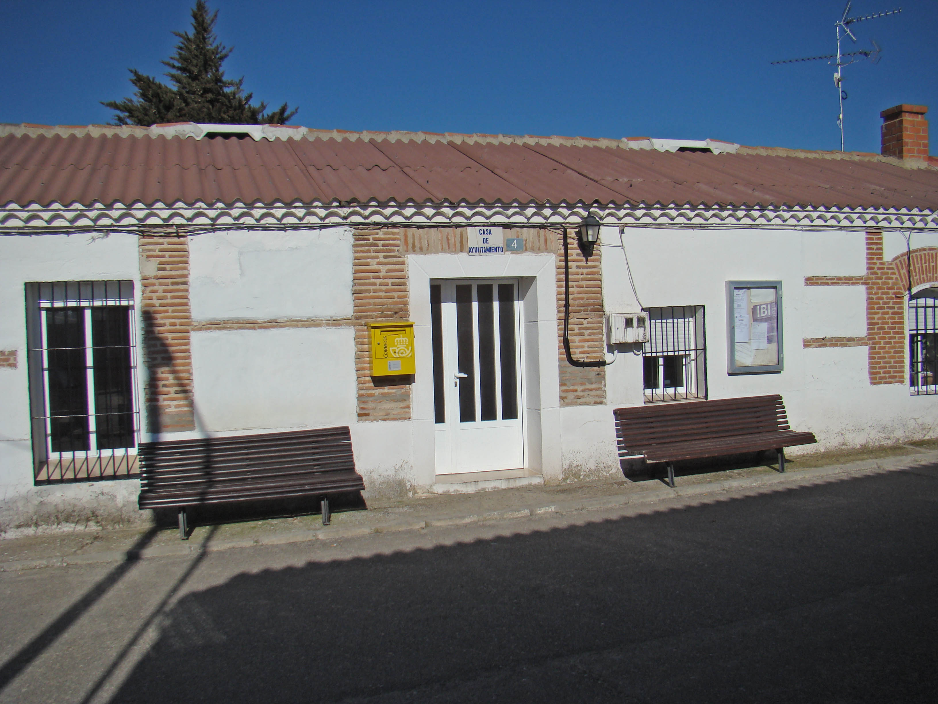 Moraleja de las Panaderas en la provincia de Valladolid, España. Calle de la Iglesia donde se encuentra el Ayuntamiento.